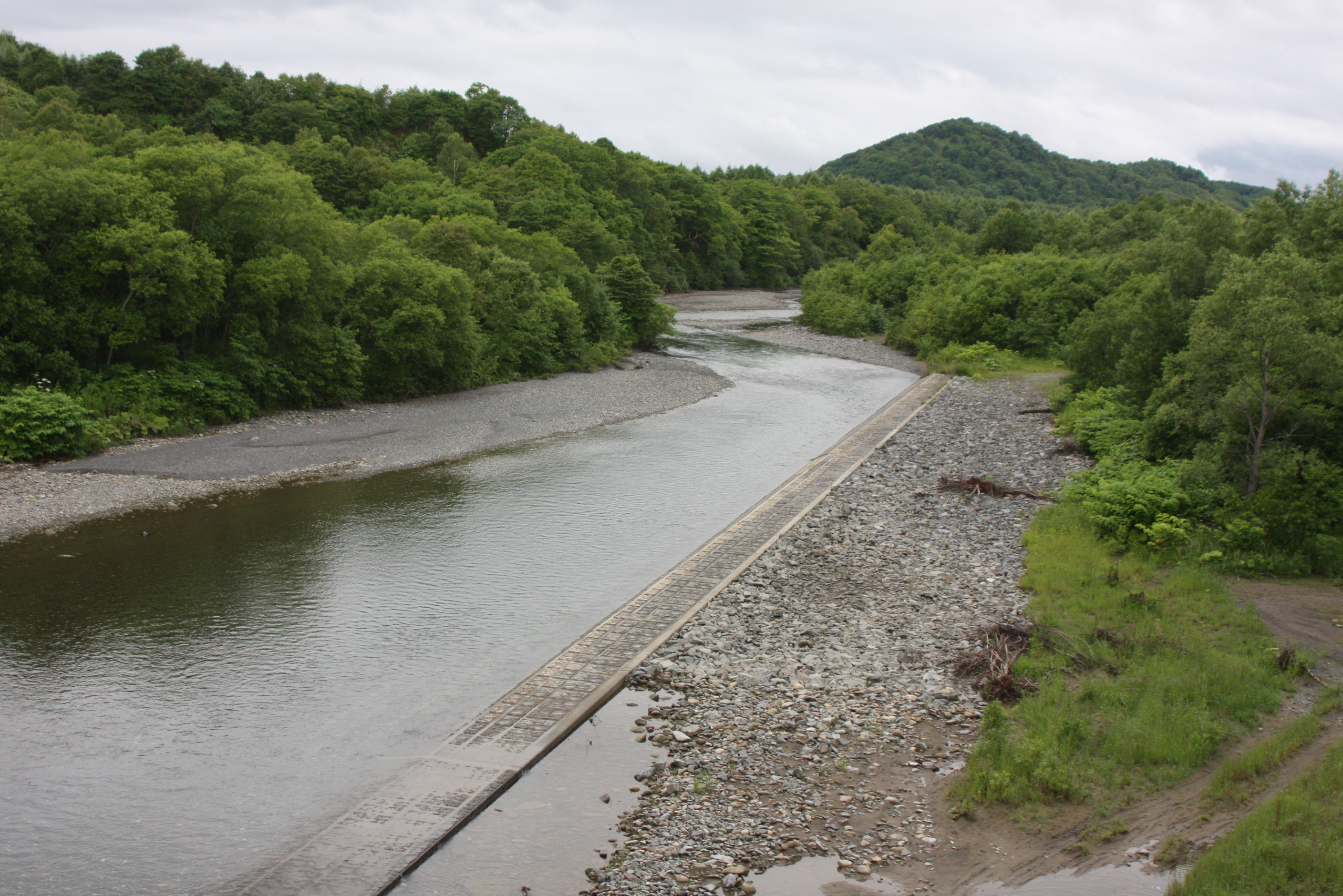 楽古川（広尾町） 楽古橋より上流を望む